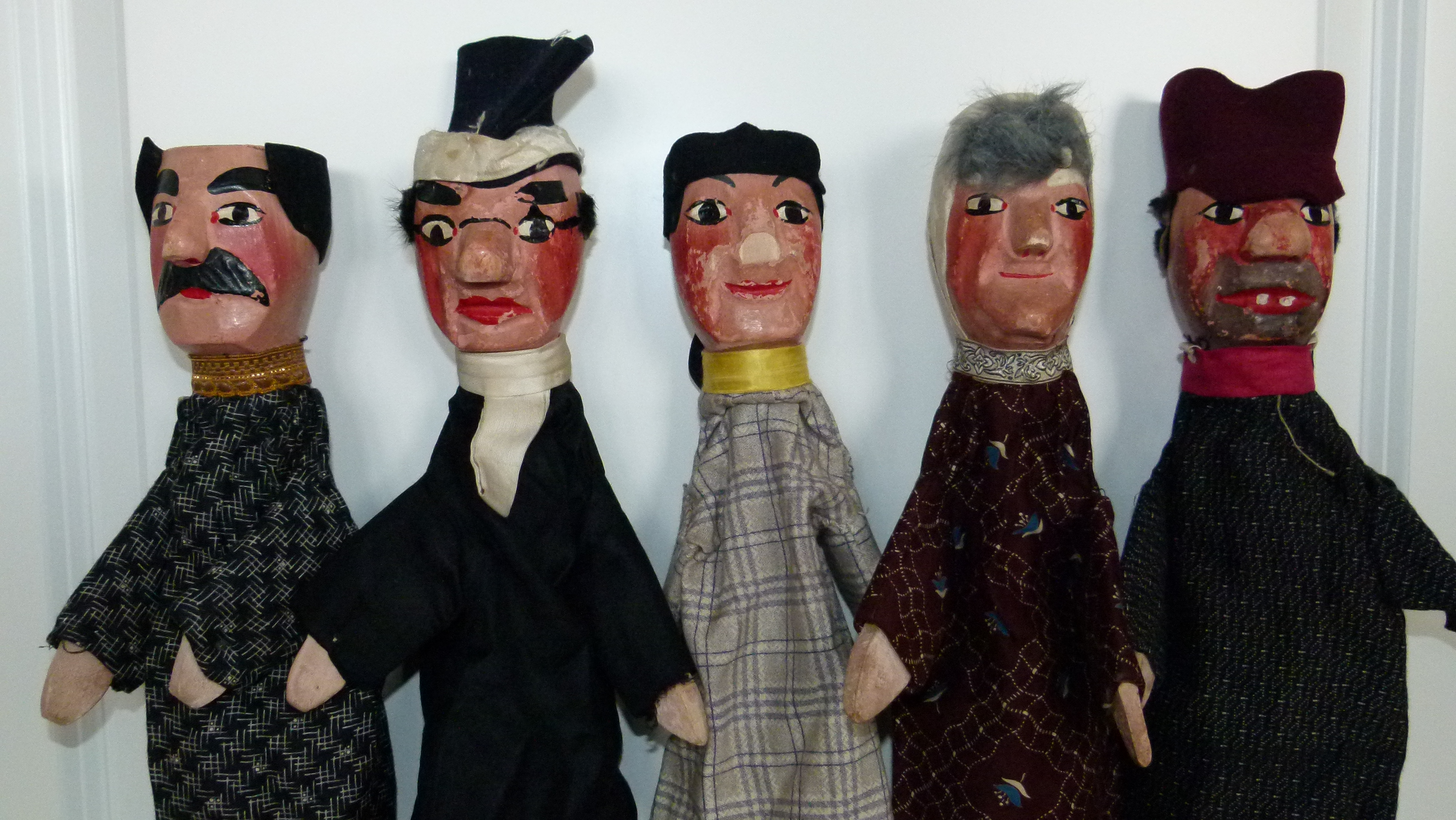 Historische Handspielpuppen aus Frankreich